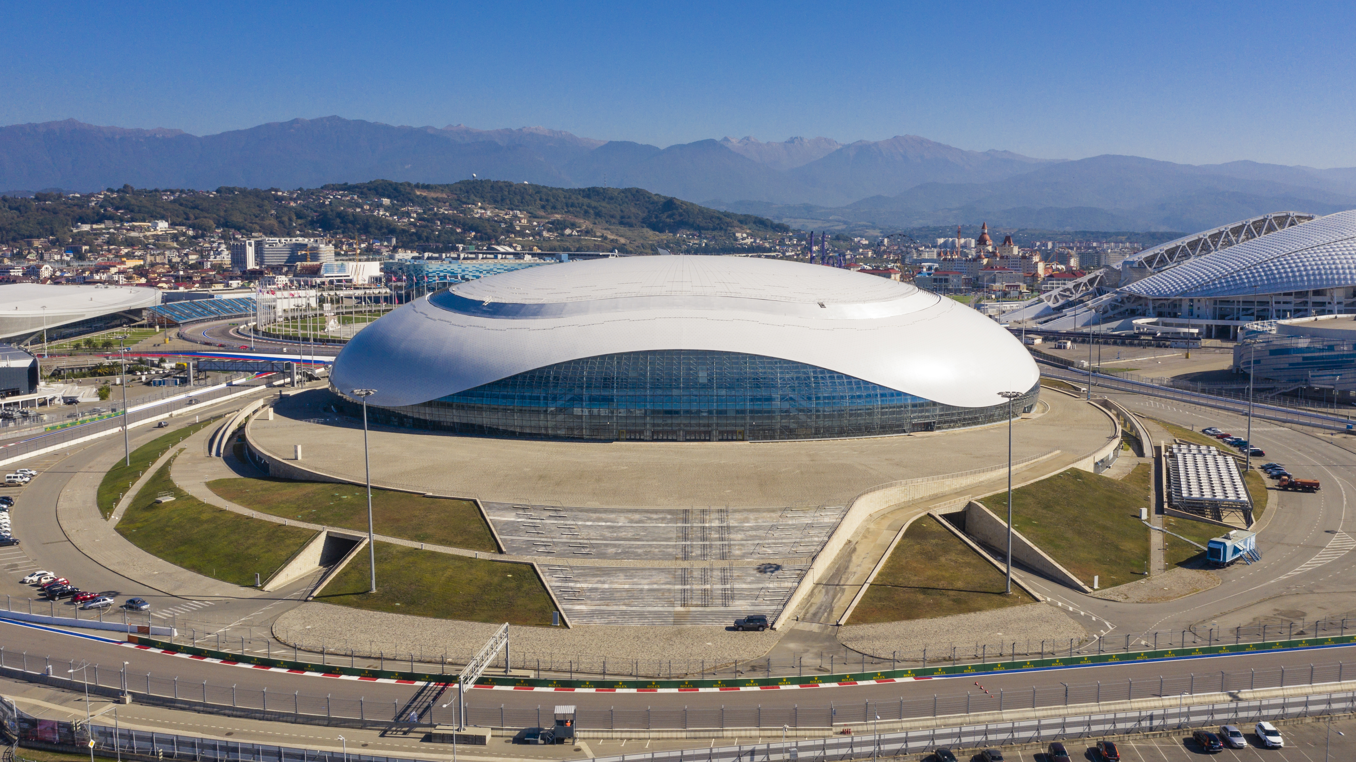 Blick auf den Olympiapark Adler (Sotschi)